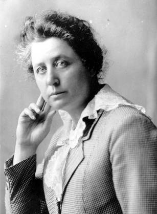 Marie Diana Equi, née le 7 avril 1872 à New Bedford (Massachusetts) et morte le 13 juillet 1952 à Portland (Oregon), est un médecin et une anarchiste américaine d'origine italienne par son père et irlandaise par sa mère.